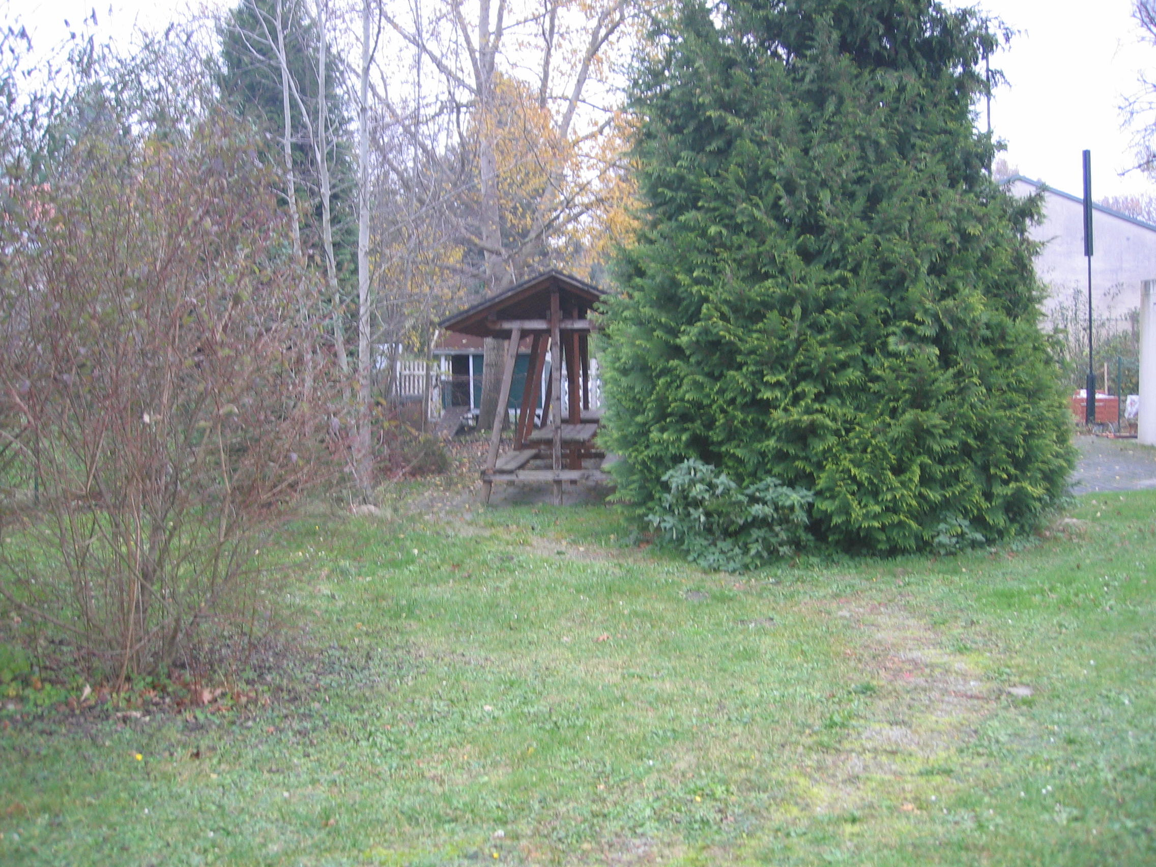 Ruhland, Ortrander Straße, Gartenteil (Ersatz für den Schulgarten der Geschwister-Scholl-Schule) hinter der Turnhalle, Sitzplatz im Schatten eines Lebensbaums